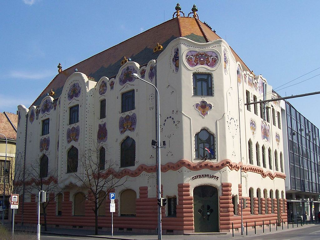 Cifra palota, Kecskemét